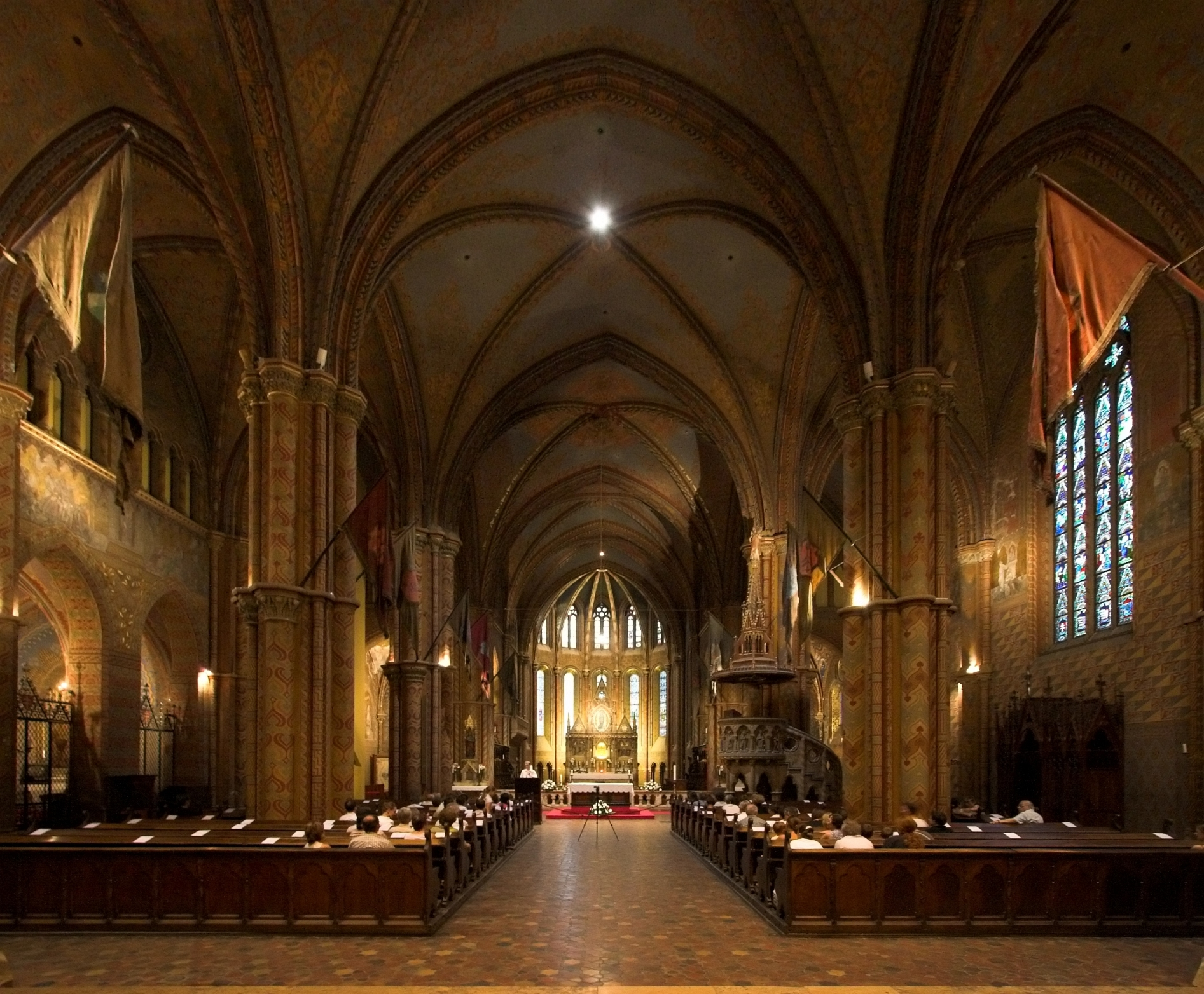 A Mátyás-templom belső tere a templom felújítása idején. A képet Dorgan orgonaestje emlékére ajánlom :)